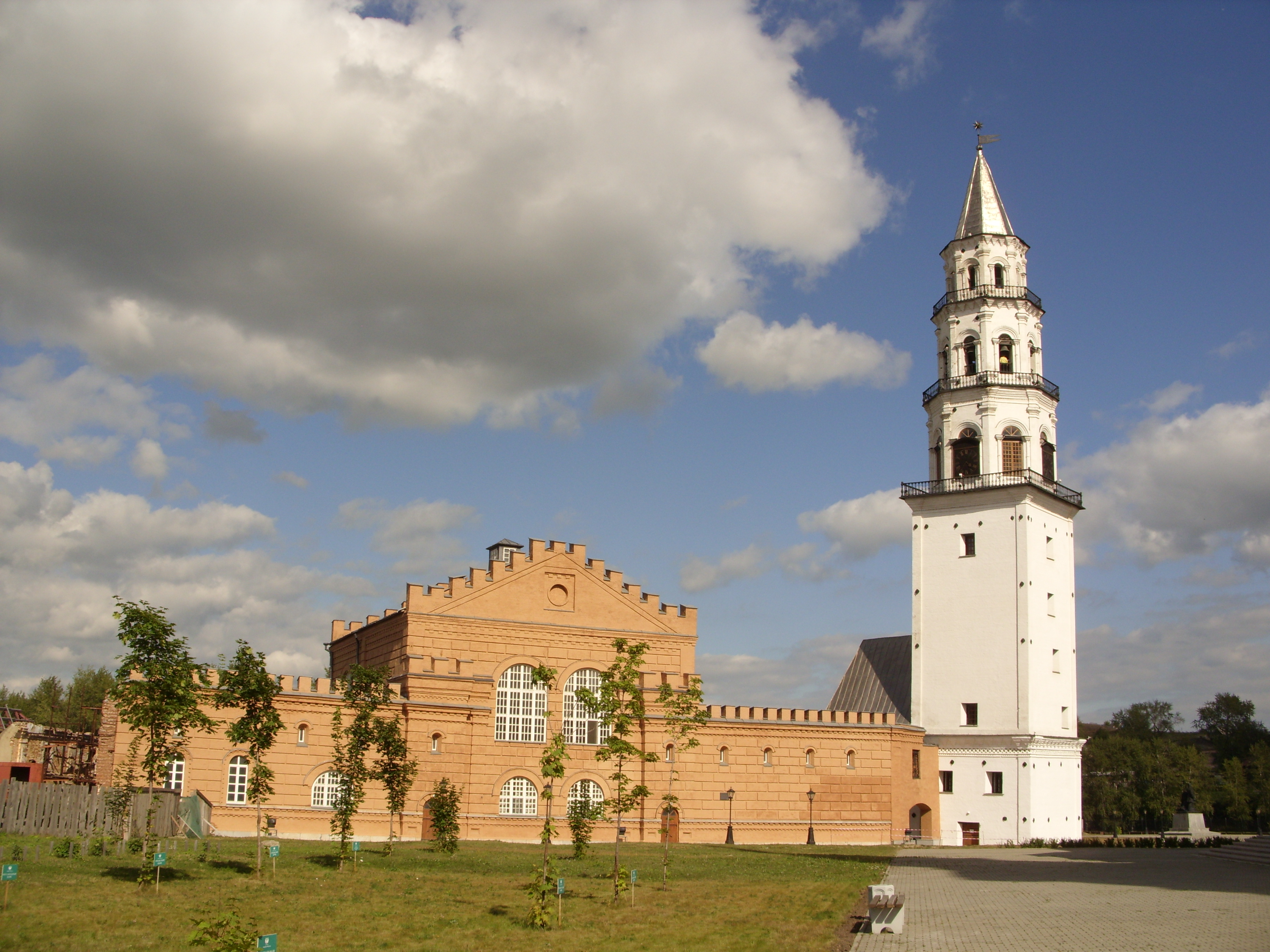 Historické muzeum Něvanského kraje, Něvansk